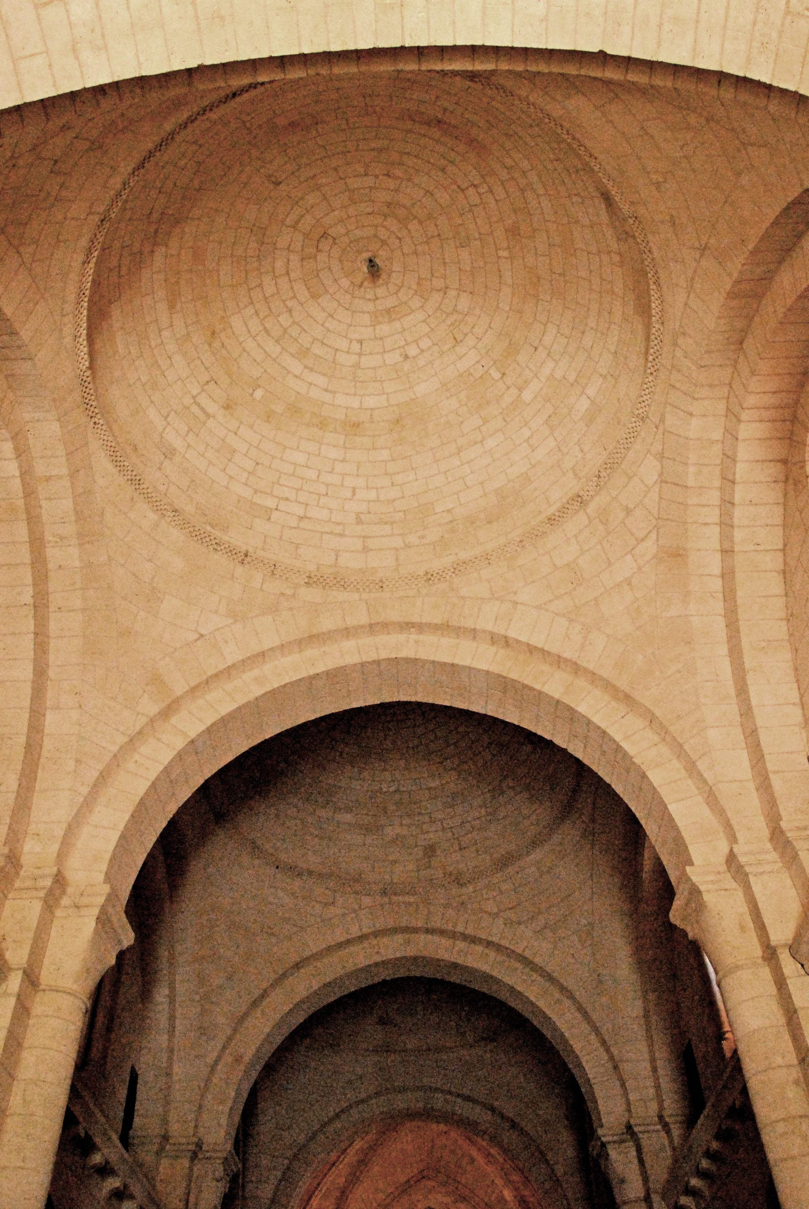 Genzac-la-Pallue, Schiff, 2. - 4. Kuppel